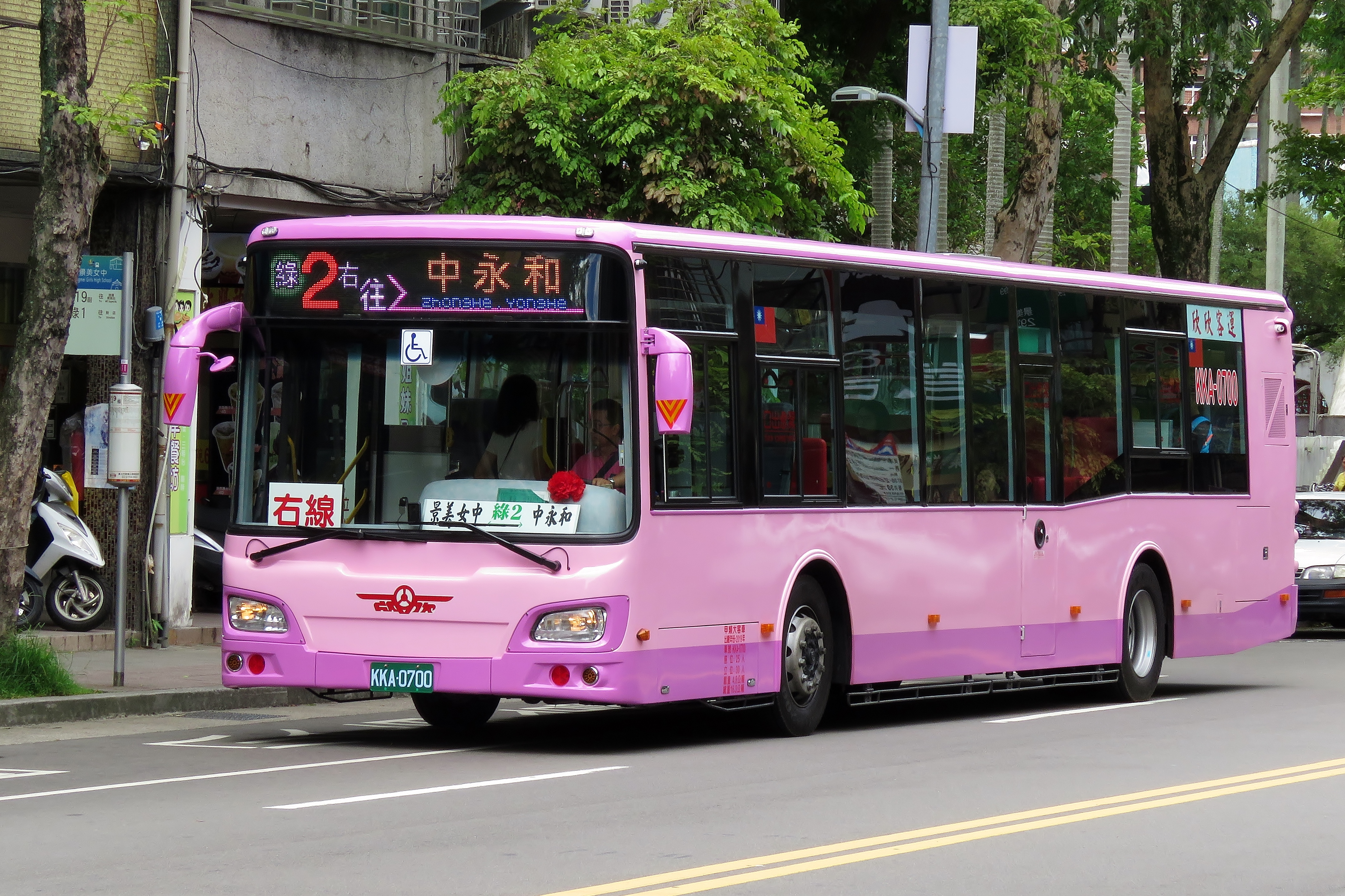 欣欣客運2019年HINO HS8JRVL大客車KKA-0700行駛新北市市區公車綠2右線，停靠「景美女中」站牌。